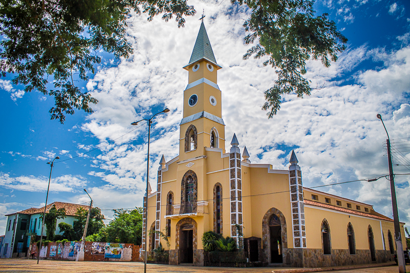 A Paróquia Nossa Senhora da Boa Esperança foi instalada no dia 08 de fevereiro de 1948, pelo Bispo de Parnaíba, Dom Felipe Condurú Pacheco, e experimentou em suas várias etapas, acontecimentos marcantes, grandes desafios e conquistas. No dia 28 de janeiro de 1948 tomou posse o primeiro Pároco, o padre Joaquim Sabino Dantas e ficou a frente até o dia 17 de fevereiro de 1951. O segundo pároco a continuar com o trabalho da Paróquia foi o padre Jonas Pinto e fica a frente até o dia 24 de maio de 1953. O terceiro Pároco foi o padre Raul formiga, onde reforçou o grupo Apostolado da Oração e fez doações de bíblias para os fiéis. Em 1957 assume os serviços da Paróquia o padre Oséas Lopes de Mesquita. Cinco anos depois, em dezembro de 1962, assume o padre João de Aragão Coutinho, quando este deixa a Paróquia, houve grande dificuldade em se encontrar outro Pároco que pudesse assumi-la, mas, graças ao padre Joaquim Sabino Dantas, após tantas recusas, assim falavam os mais velhos, aceitou pela segunda vez, assumir os serviços da Paróquia em dezembro de 1968 e permaneceu até o dia 02 de fevereiro de 1978. Em 1978 o padre Ladislau João da Silva, assume a Paróquia e desenvolve um grande trabalho de evangelização dentro da Paróquia, criou grupos de jovens, fundou a Rádio Esperantina FM, criou o Centro de Treinamento São Vicente, estabeleceu o intercambio entre Esperantina e Alemanha, entre outros. Em janeiro de 2001 assume o padre Carlos Alberto Seixas de Aquino. Carlos Seixas fundou o Centro de Defesa da Vida (CDV), reformou capelas nas comunidades rurais, fortaleceu o grupo de coroinhas, criou a primeira escola de formação para Missionários do Meio Popular, entre outros. No dia 28 de julho de 2007, assume a Paróquia o padre Hernesto Pereira de Oliveira e promove a reforma do Centro de Treinamento São Vicente, troca o sistema de som e os bancos da Igreja Matriz. Padre Hernesto continua na missão de evangelização, junto com as comunidades, as pastorais, os grupos, entre outros.